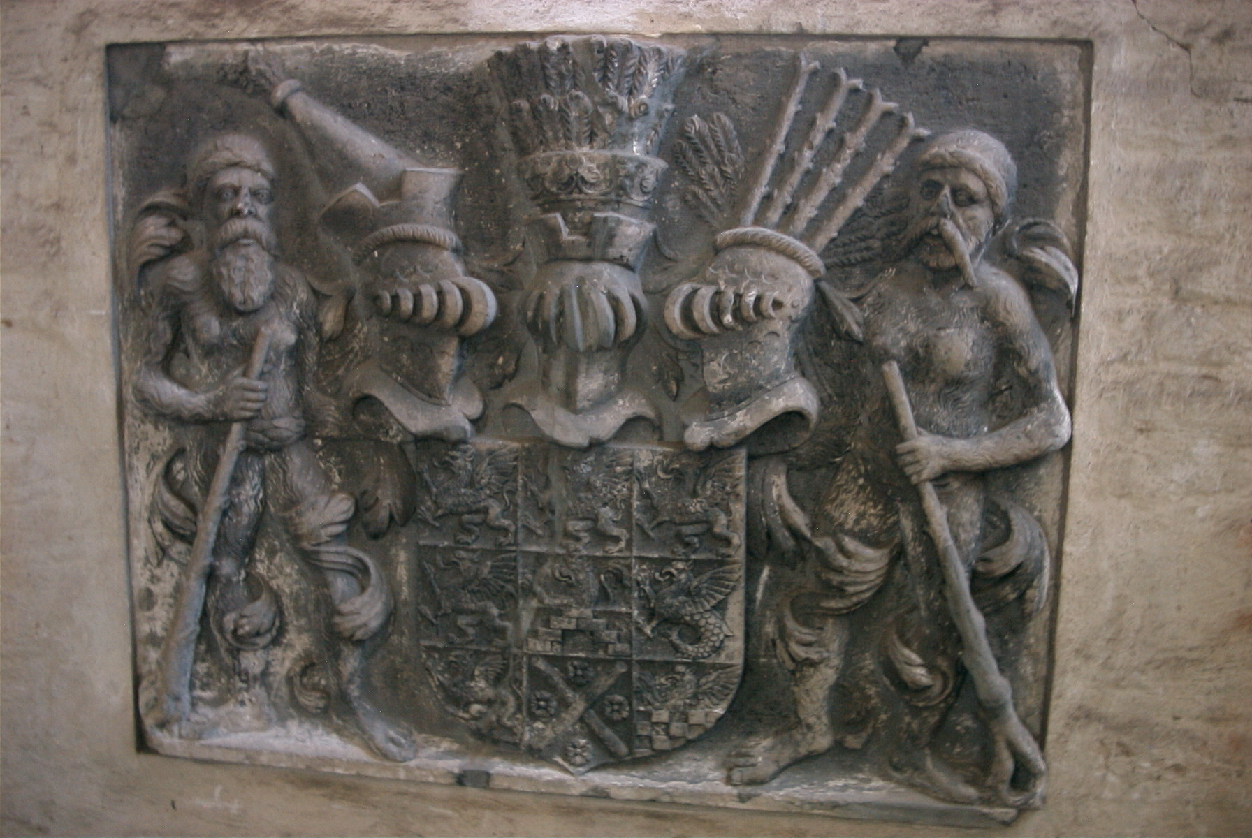 Wappenstein vom Wolgaster Schloß in Petrikirche